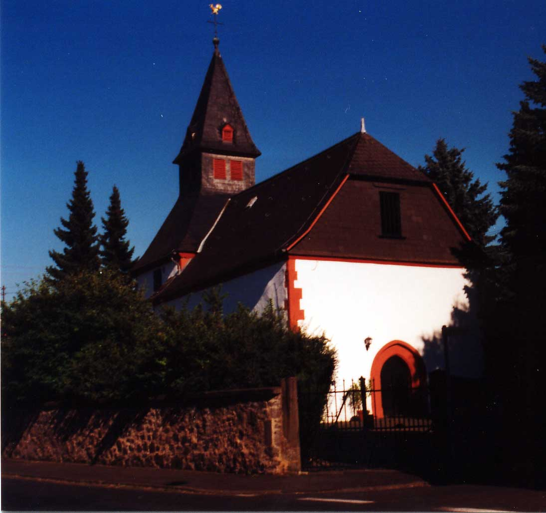 Kirche Ettingshausen (Gemeinde Reiskirchen), eigenes Foto